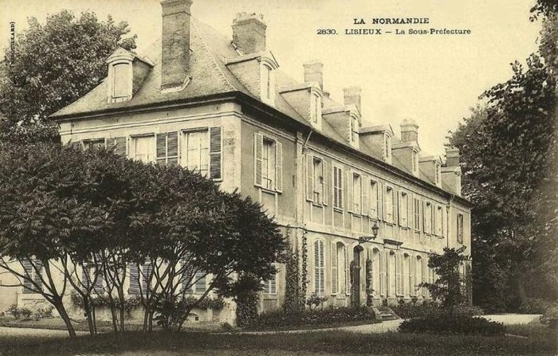 Lisieux, département du Calvados, sur une carte postale de la fin du 19e ou du début du 20e siècle. Sur un îlot au milieu de la Touques. La sous-préfecture d'avant les bombardements de juin 1944.